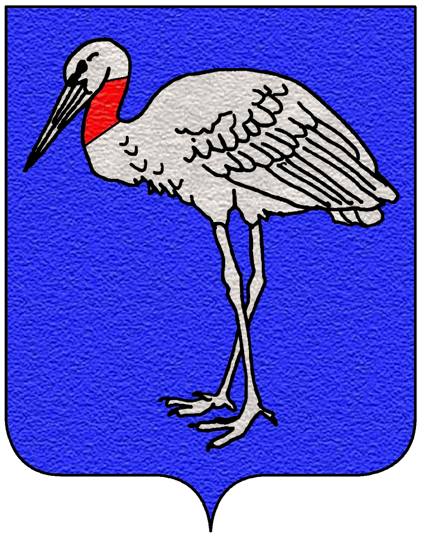 Stemma della famiglia Cicogna, appartenente al patriziato di Venezia ed a quello di Milano.